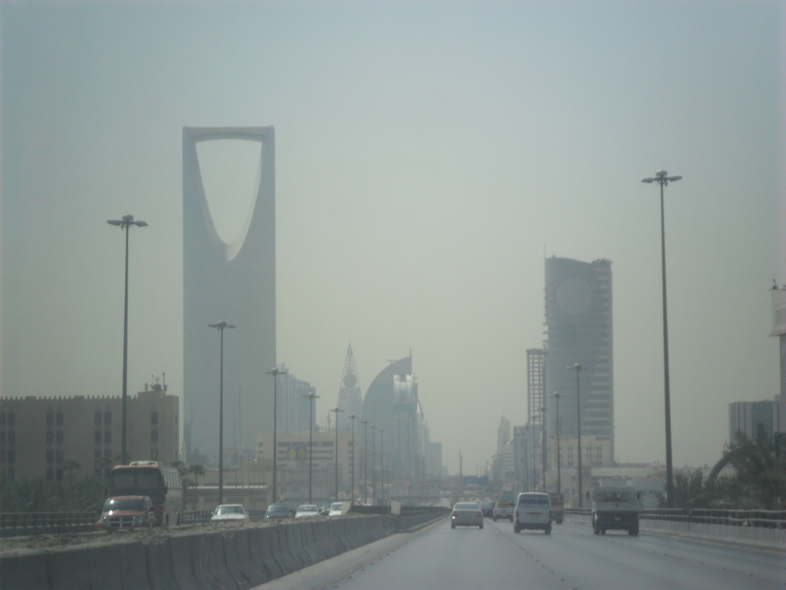 طريق الملك فهد في حي العليا بالعاصمة السعودية الرياض.